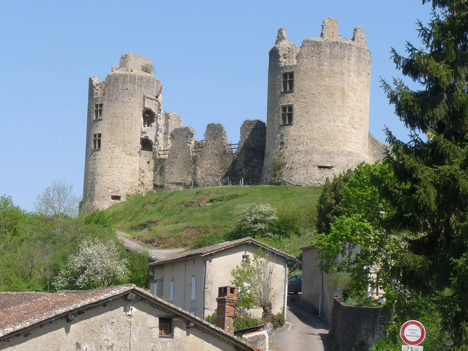 Château de St-Germain-de-Confolens, Charente, France